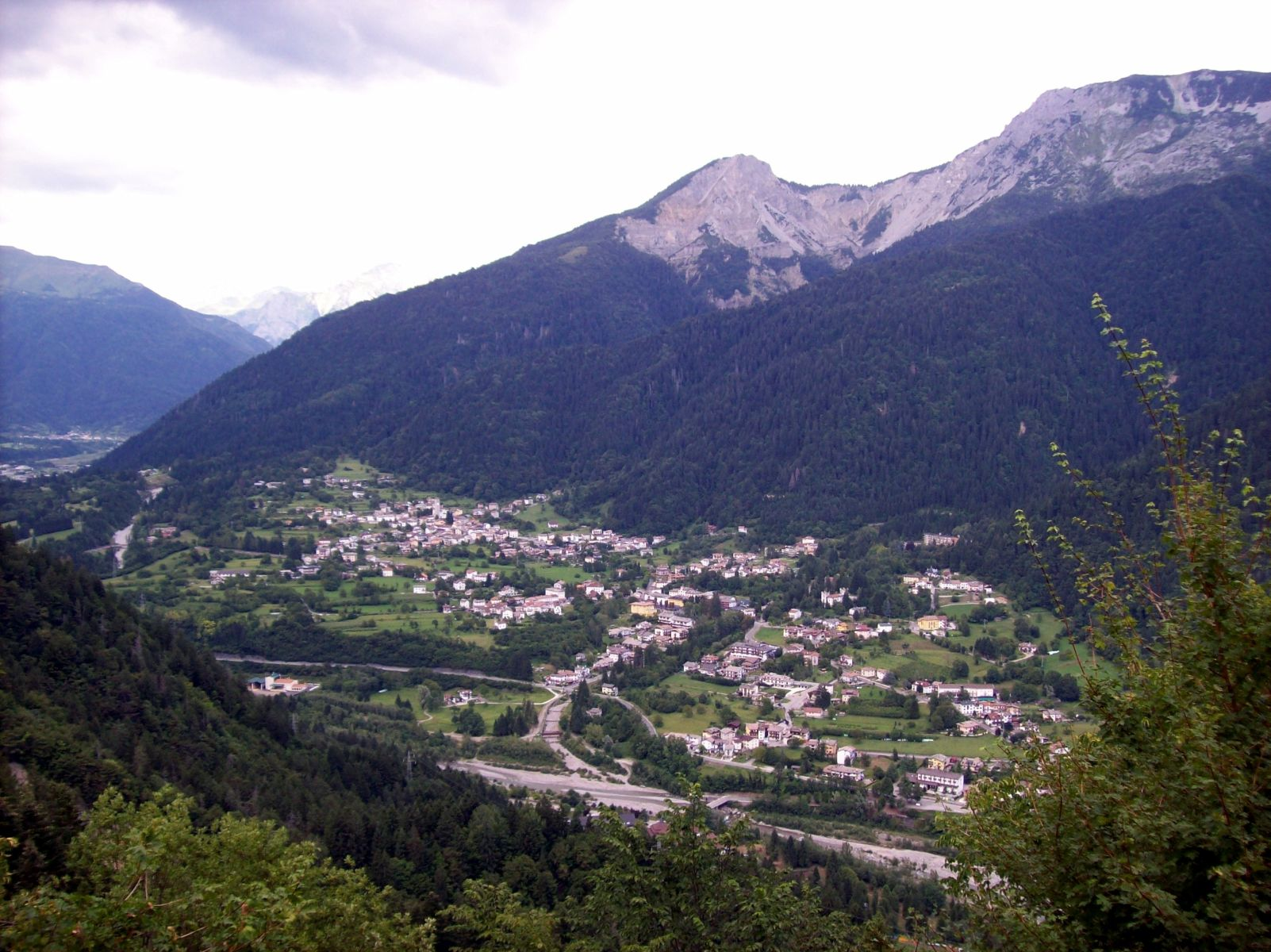 Panorama di Arta Terme dalla Pieve di Zuglio (UD)